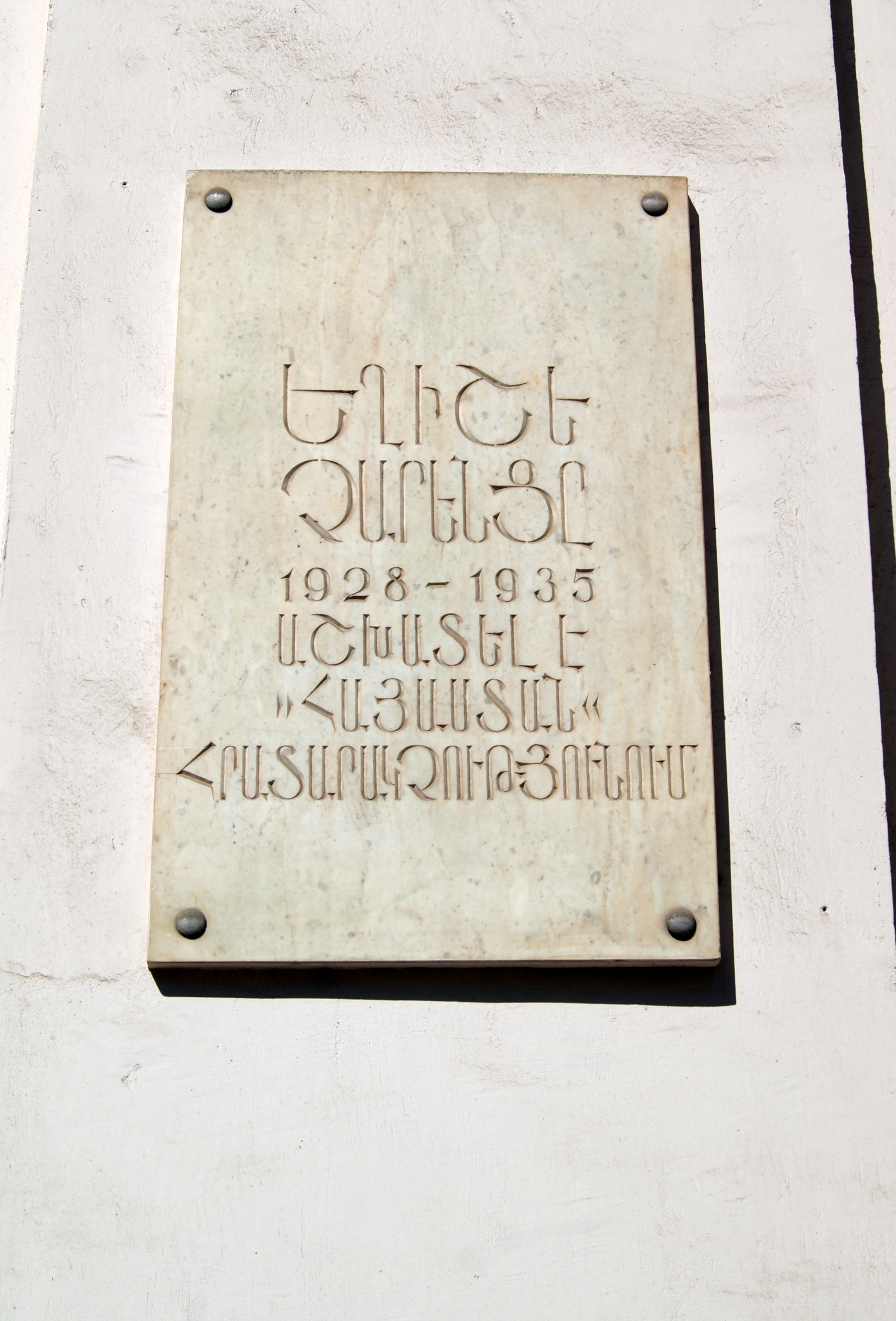 Գրքի պալատի շենքի Տերյան փող. հատվածը 6/67